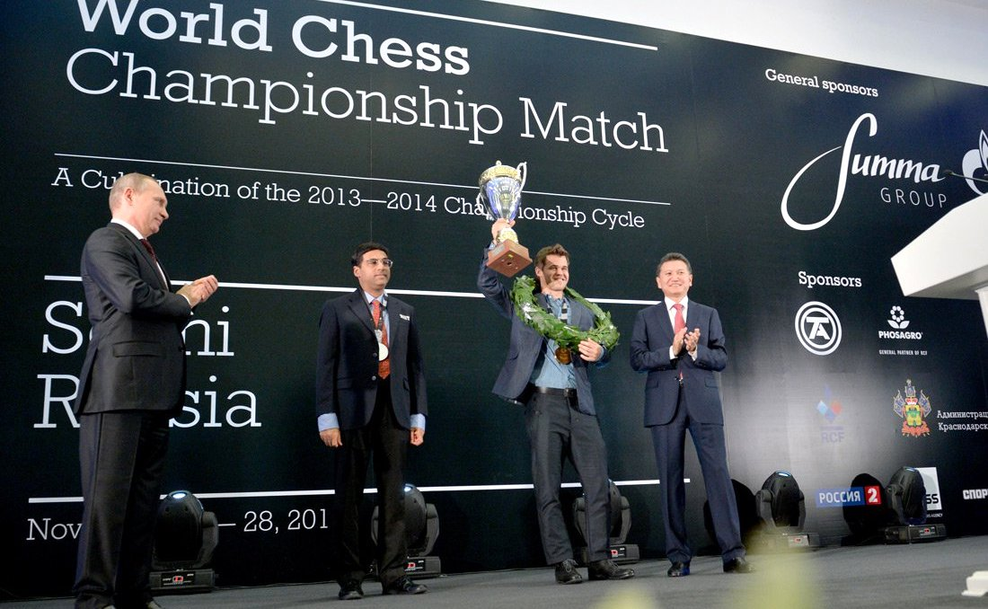 Церемония закрытия матча за звание Чемпиона мира по шахматам 2014. Сочи, главный медиацентр в Олимпийском парке.